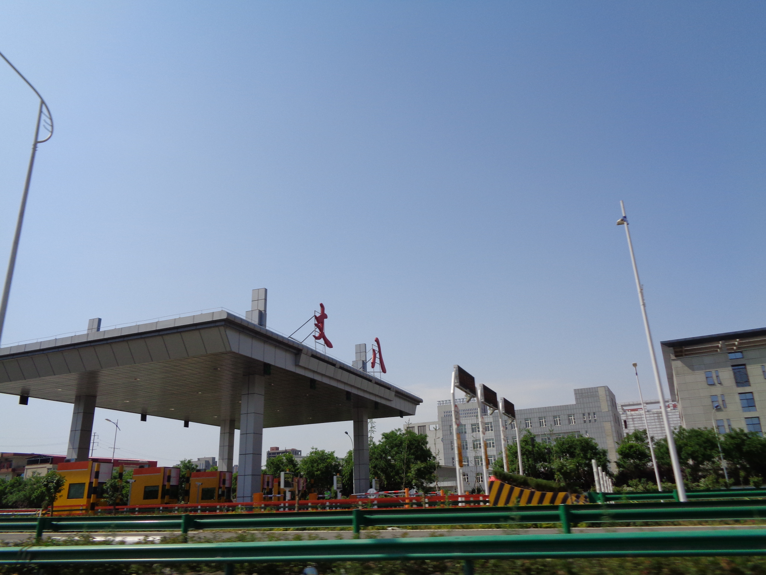 西安市雁塔区西安绕城高速公路丈八收费站